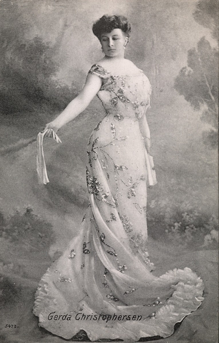 Den danske skuespilleren og sangeren Gerda Christophersen ca 1900-1905. Fotograf: ukjent.